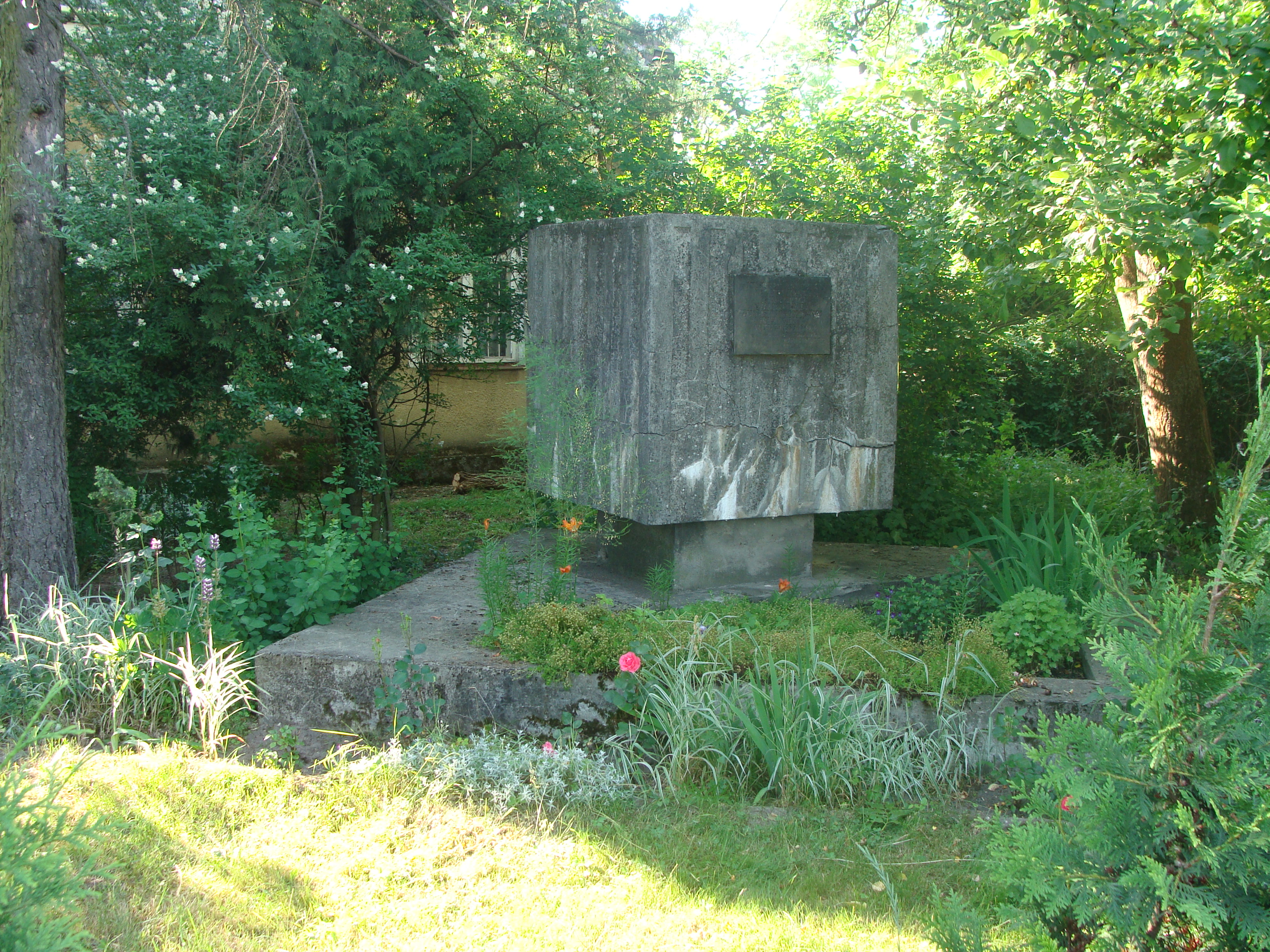 Wygoda Kozińska Pomnik